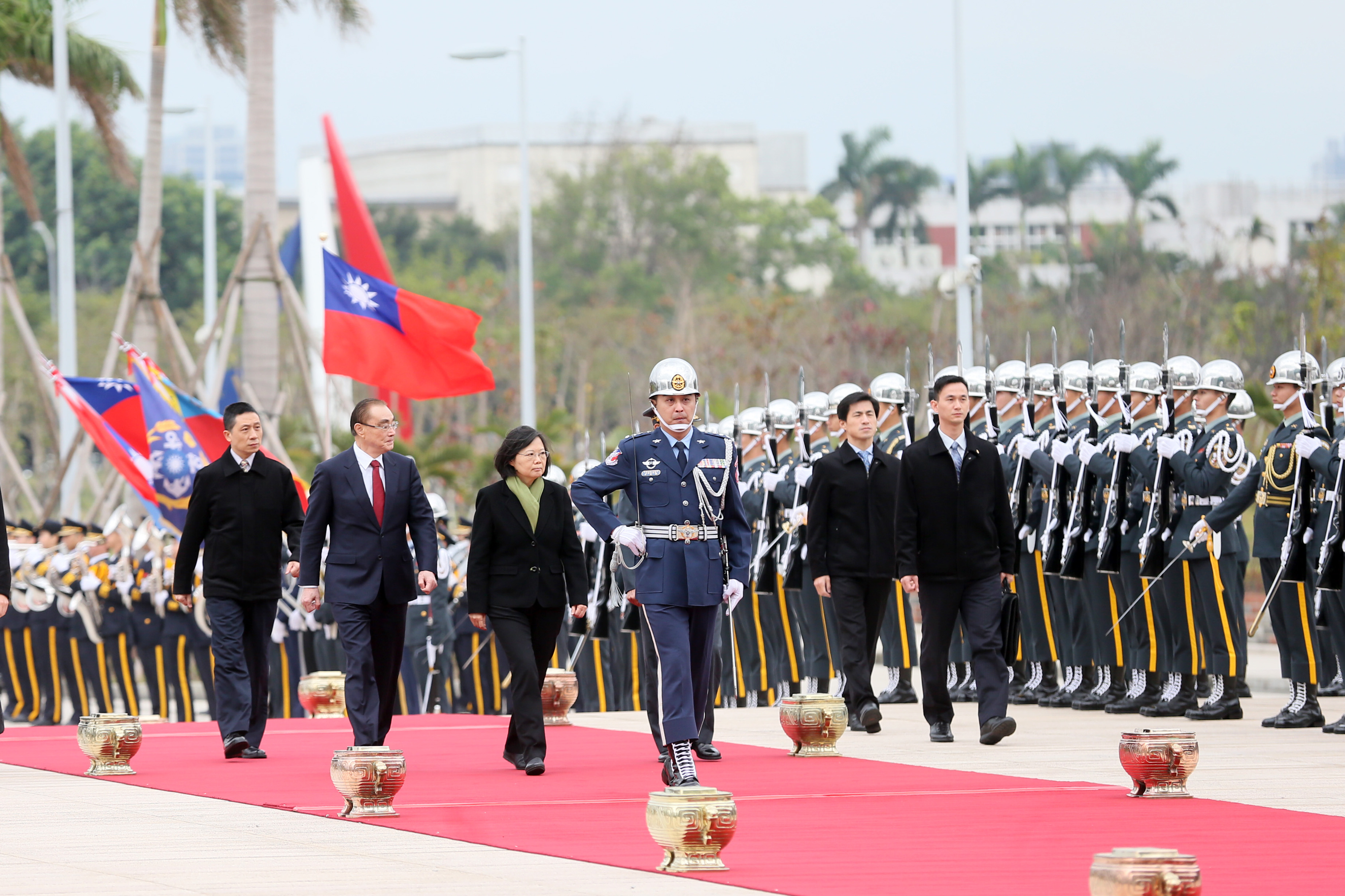 中華民國總統蔡英文出席「國防部106年新春餐會」前，在國防部部長馮世寬陪同下，校閱國防部示範樂隊、三軍聯合旗隊及三軍儀隊，接受軍禮致敬。